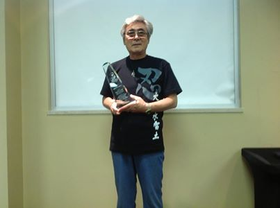 Anime North 2014、声優の柴田秀勝氏